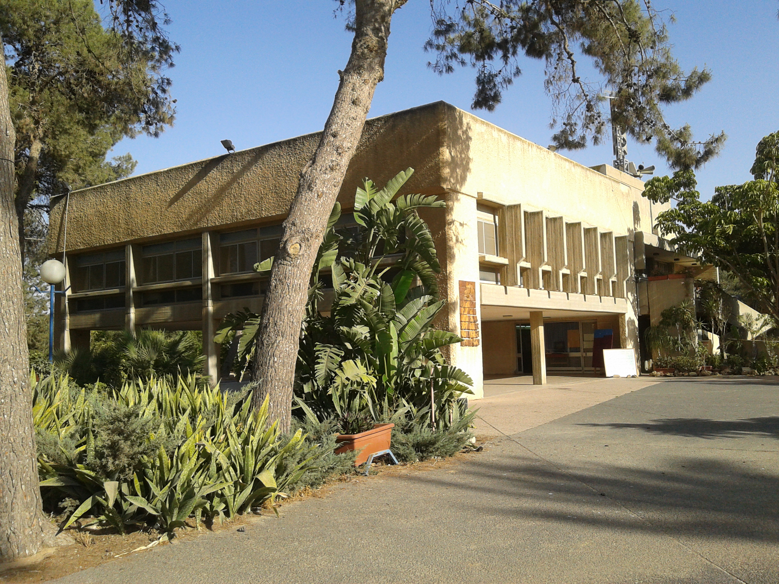 חדר האוכל בקיבוץ אורים, מאי 2013